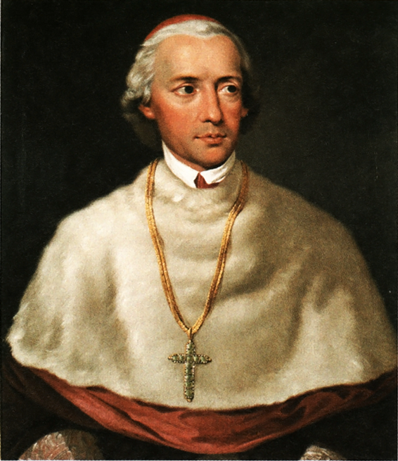 Porträt des Linzer Bischofs Joseph Anton Gall